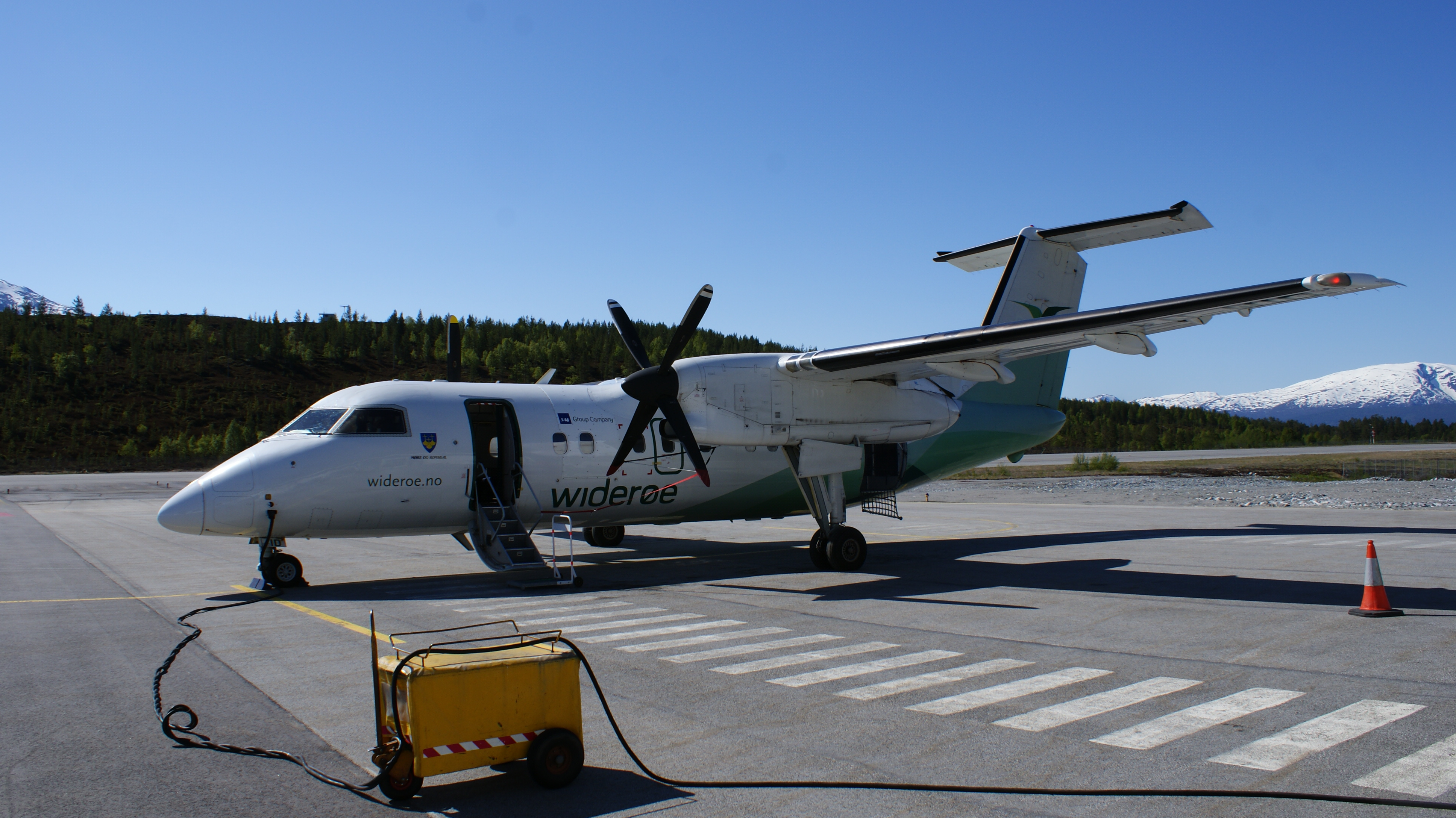 Widerøe de Havilland Canada Dash-8 103 at Sogndal Airport, Indre Sogn, Sogn og Fjordane, Norway.